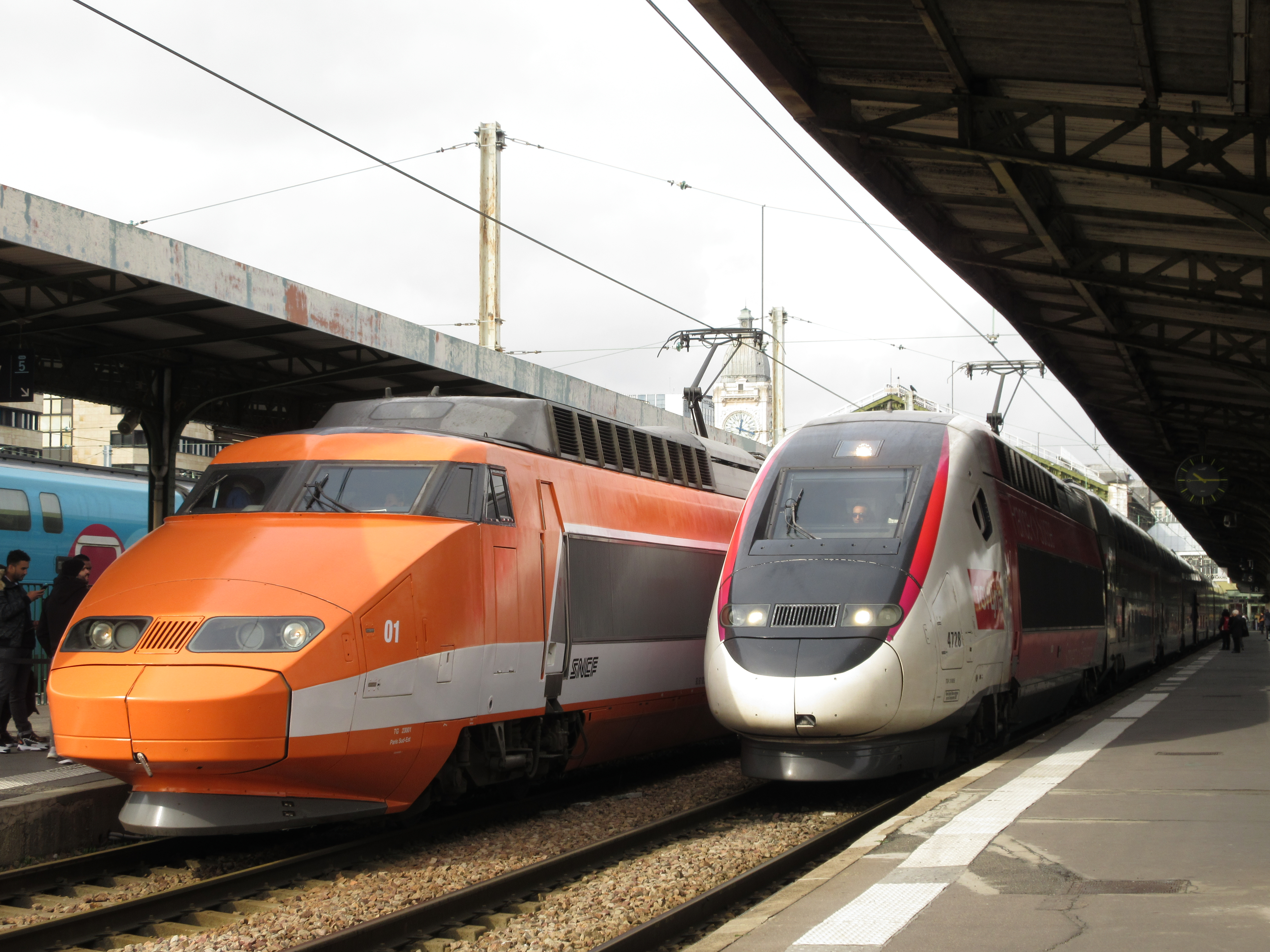 La première rame TGV Sud-Est (TGV 01, surnommé Patrick) et une rame TGV 2N2 Lyria (TGV 4728), à Paris-Gare-de-Lyon